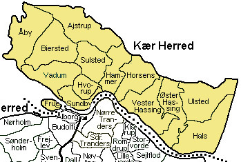 Kær Herred, Aalborg Amt, Denmark Source: Map by Svend-Erik Christiansen